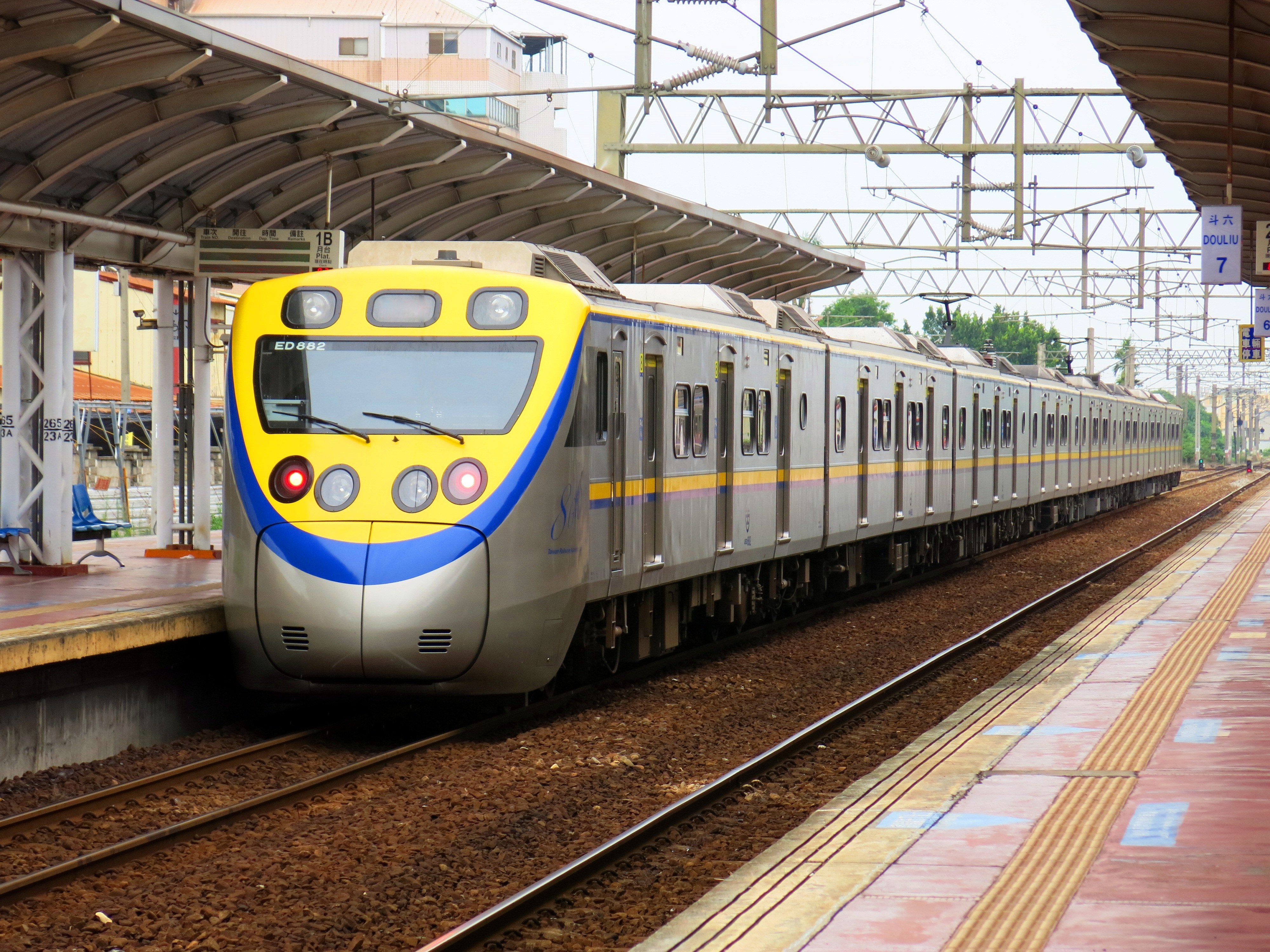 中文（台灣）: 臺灣鐵路管理局電聯車EMU882，停靠斗六車站第一月台B側。